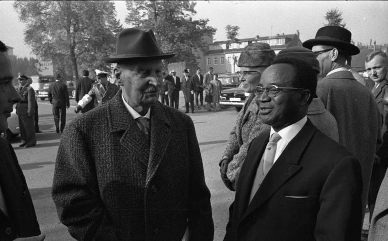 Afrika-Woche 1962 in der Beethovenhalle Herzog Adolf Fried. zu Mecklenburg